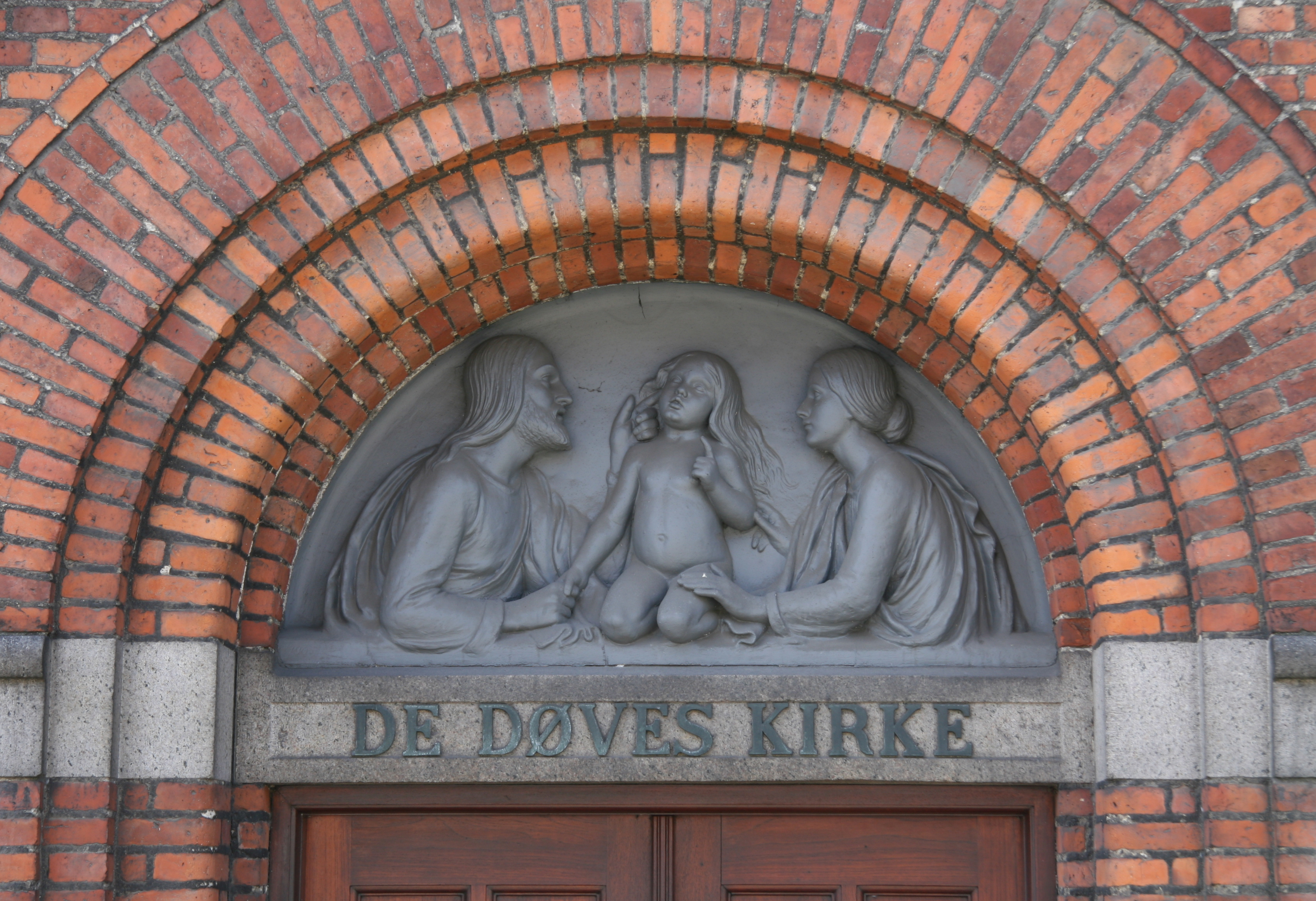 De Døves Kirke in Copenhagen, Denmark. Relief over entrance